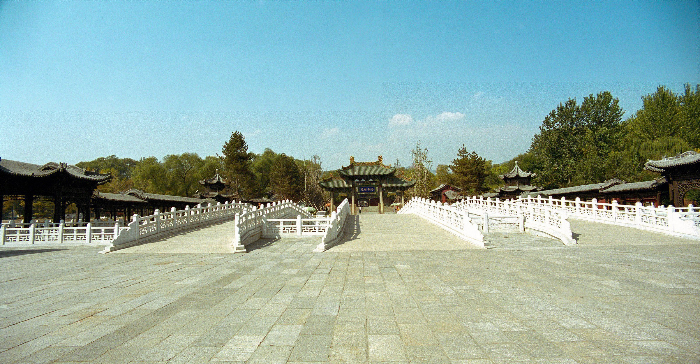 晋祠胜境